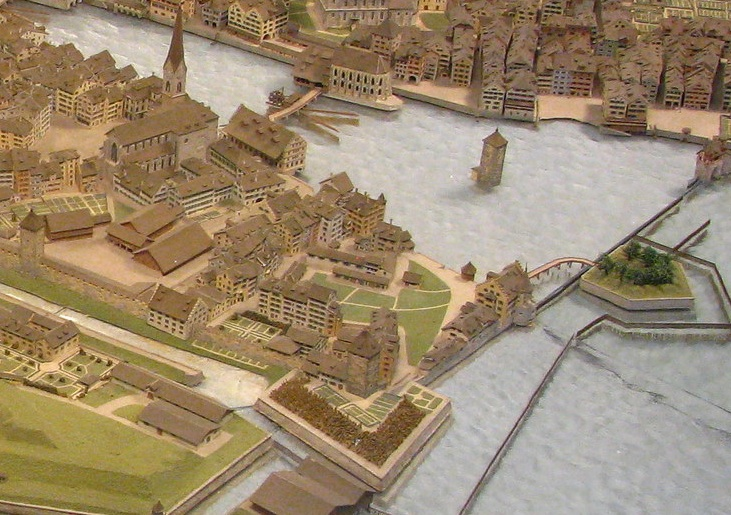 Zürich : Kratzquartier um 1790 auf dem Stadtmodell von Hans Langmack. Am Bildrand ist das Bauschänzli zu erkennen.